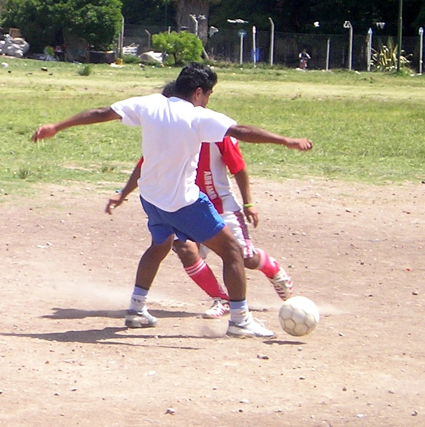 Gambeta. "Fútbol de potrero", Buenos Aires, Argentina.